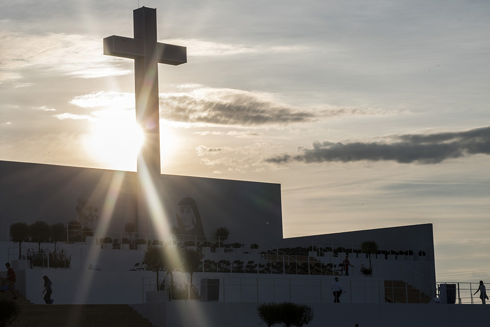 31.07.2016, Brzegi | Udział premier Beaty Szydło w Mszy Świętej Światowych Dni Młodzieży. Fot. P. Tracz / KPRM